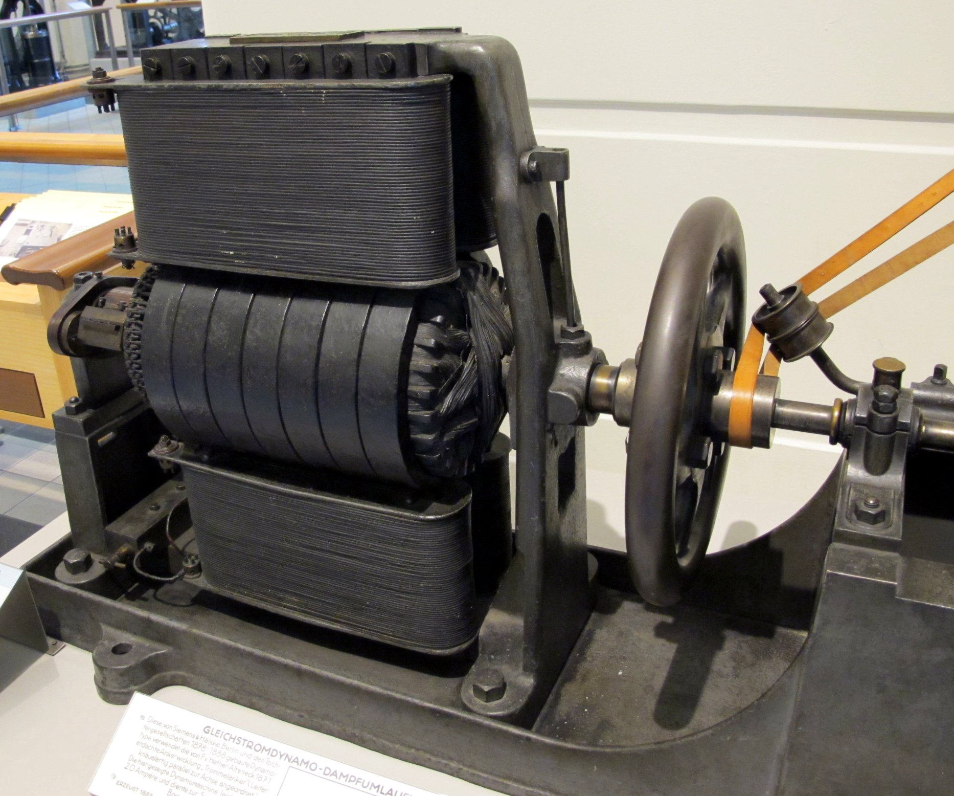 Gleichstromgenerator von Siemens & Halske welcher mit einer (nicht abgebildeten) Dampfmaschine zur Erzeugung von Gleichstrom betrieben wurde. Hersteller: Siemens & Halske, Berlin Baujahr: 1883